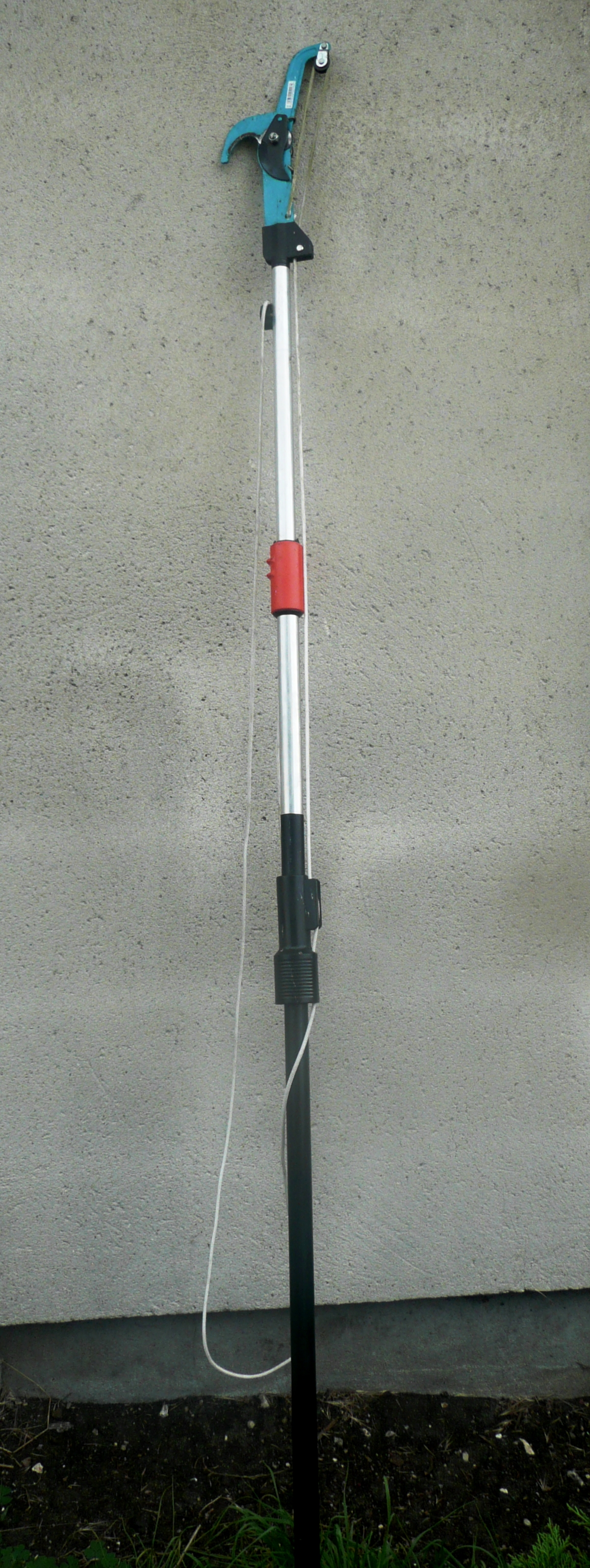 Exemple d'échenilloir